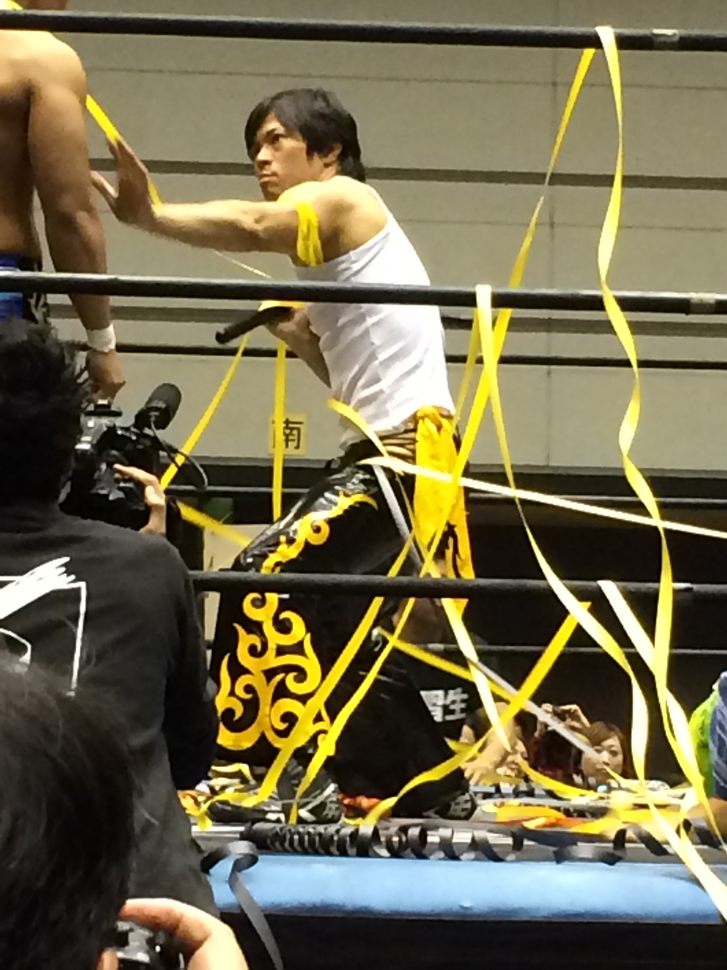 2014年大阪